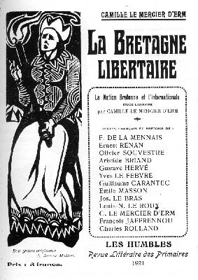 couverture de la revue "La Bretagne Libertaire" éditée en avril 1921.